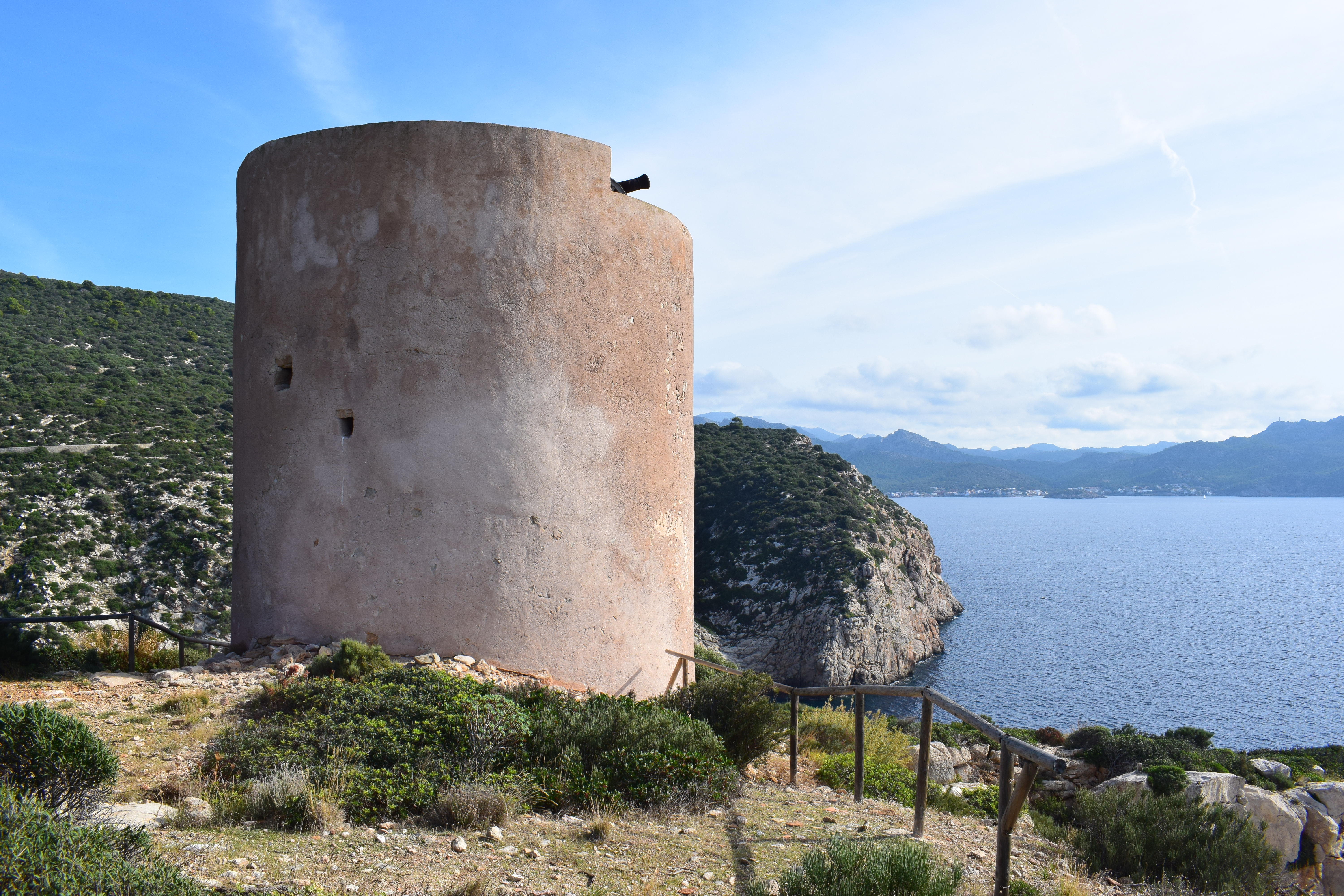 Der Torre de Llebeig, ein Wehrturm aus dem Jahr 1585, auf der Insel Sa Dragonera, Balearen.